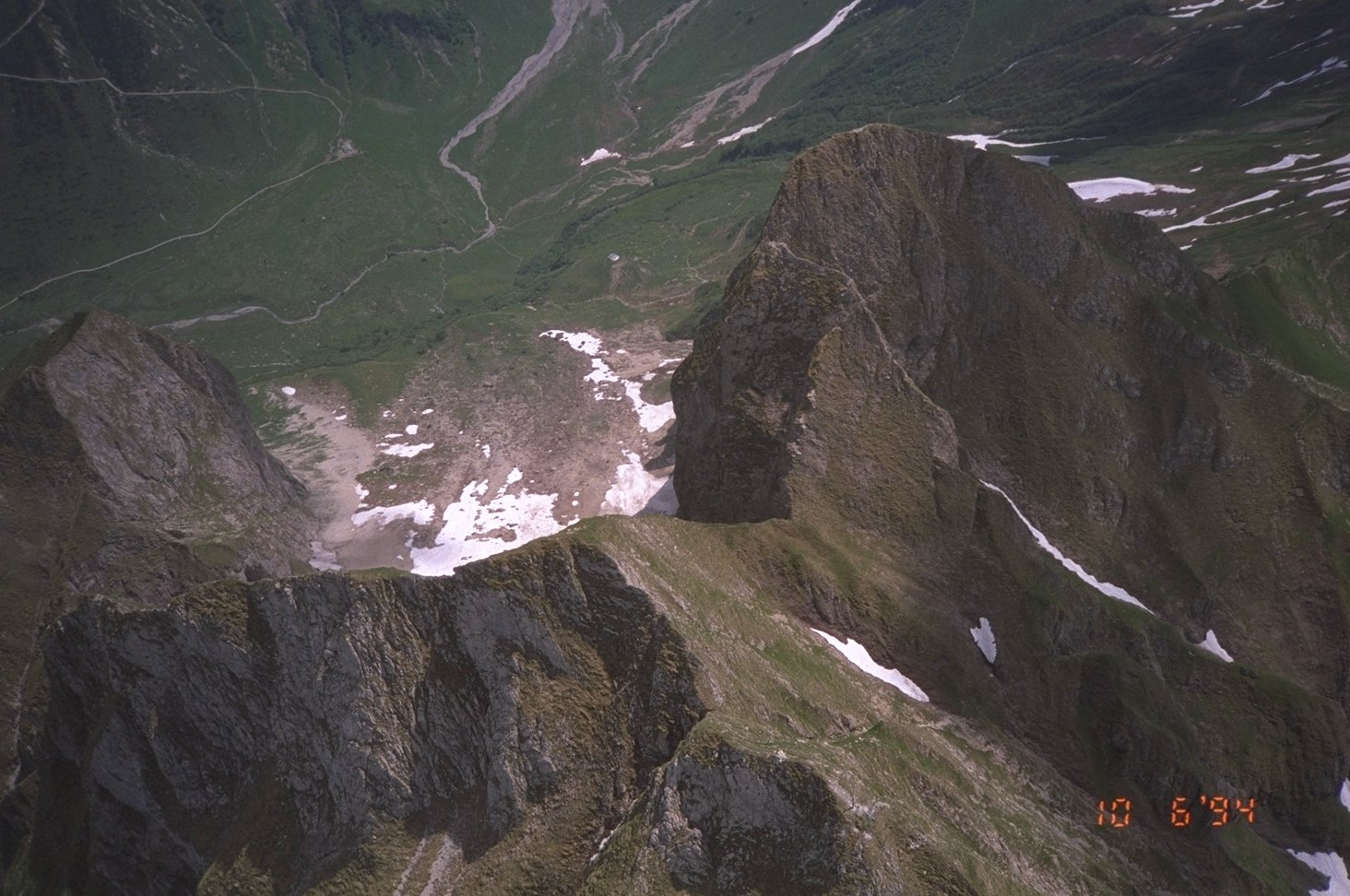 Höfats, Luftbild vom Gleitschirm